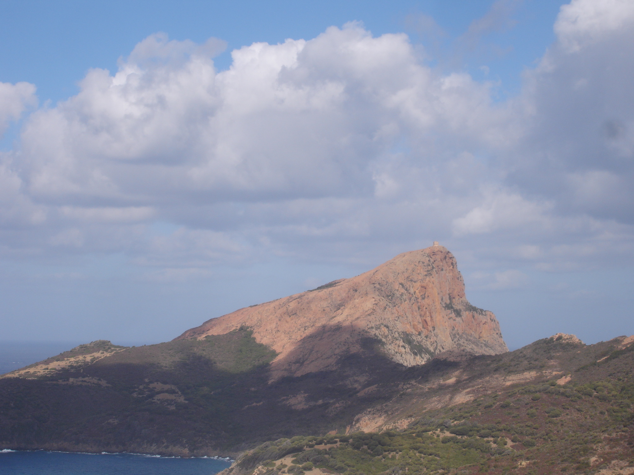 France, Corse-du-Sud (2A), Piana, Capo Rosso